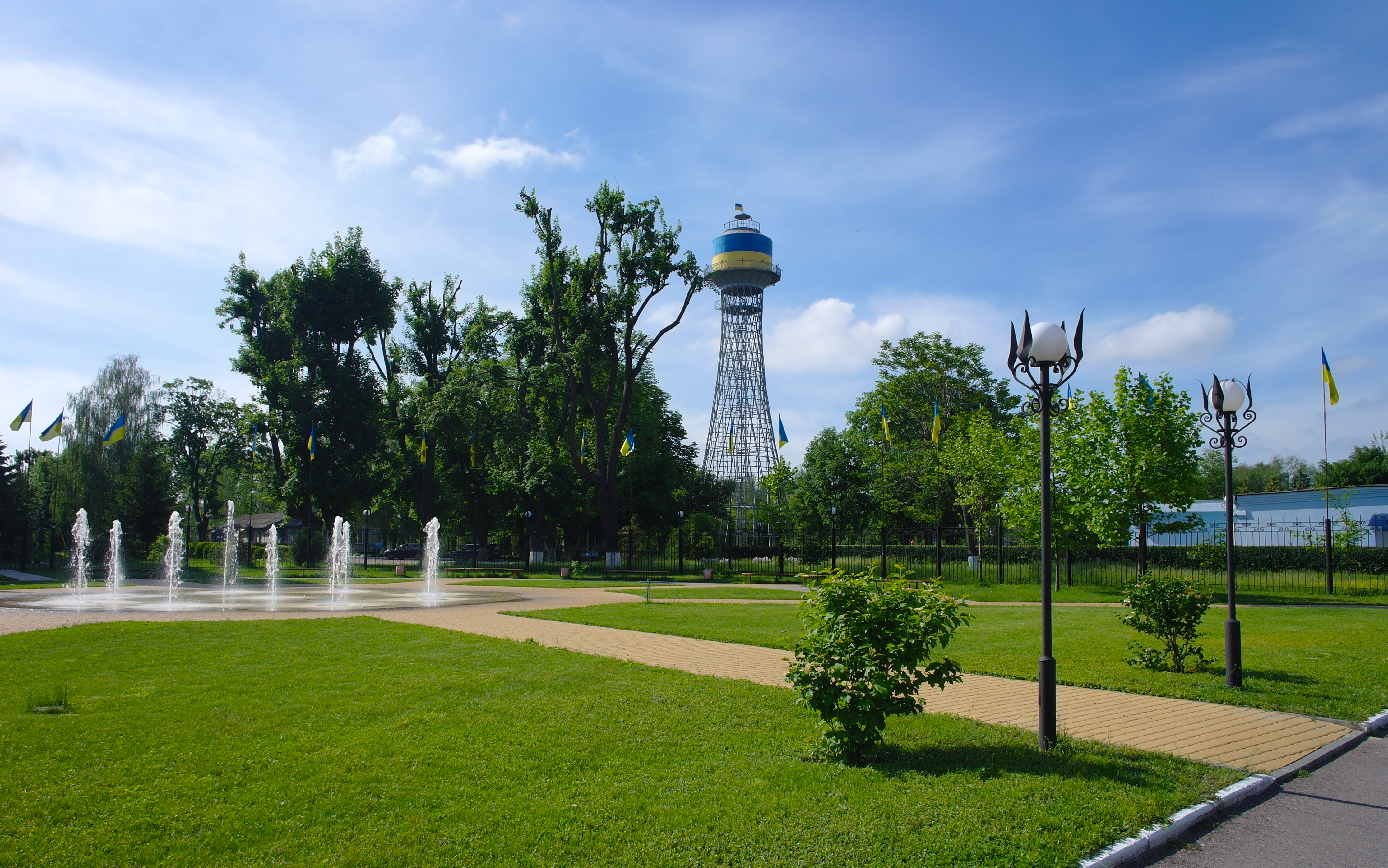 «Водограй», м. Черкаси